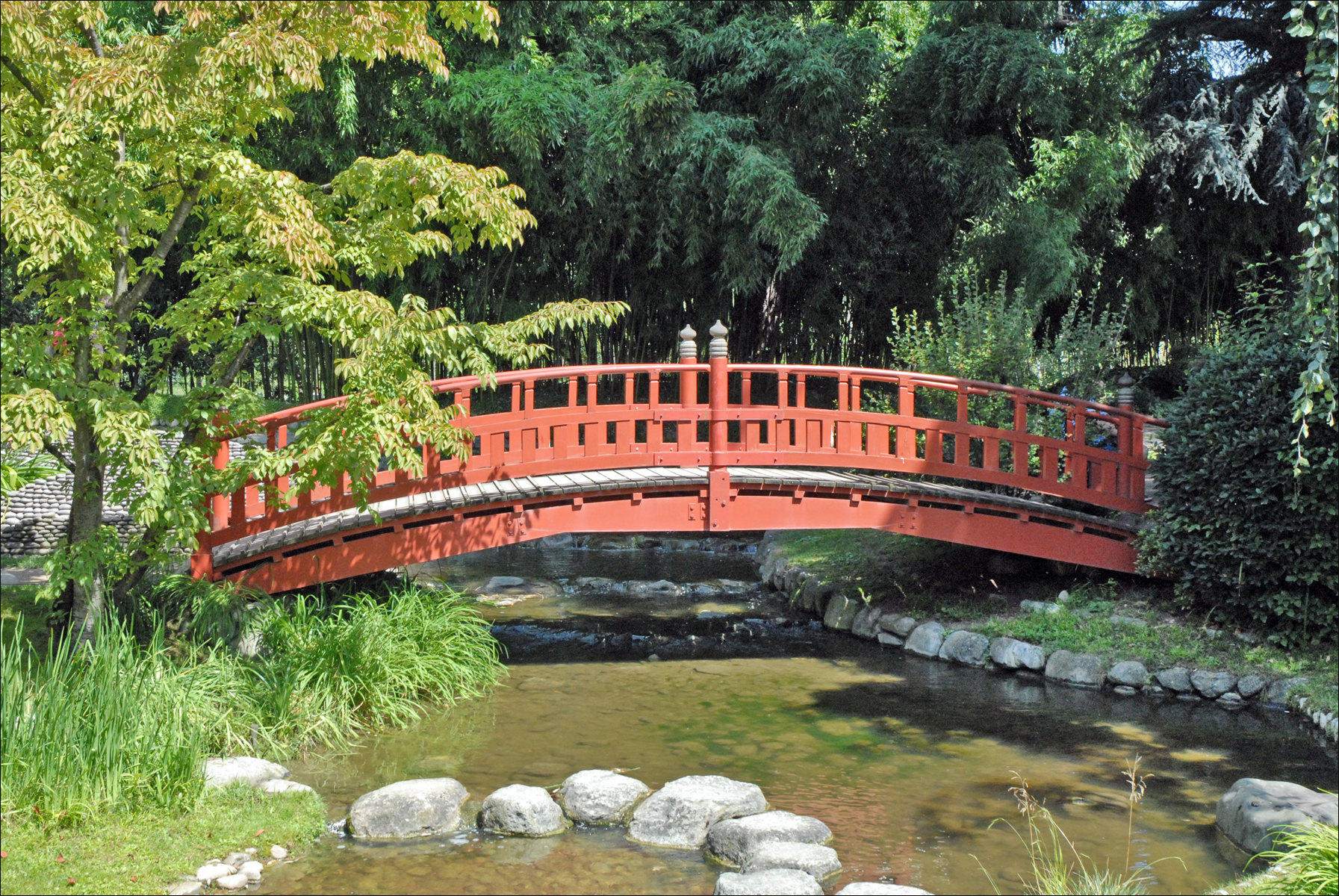 Le pont rouge du jardin japonais Propriété du Conseil général des Hauts-de-Seine, le musée Albert-Kahn de Boulogne-Billancourt est entièrement dédié à l’œuvre de ce banquier philanthrope. Le musée conserve "les Archives de la Planète", photographies et films issus de campagnes initiées dans le monde entier à la demande d'Albert Khan par plusieurs "opérateurs" (photographes, cinéastes) au début du XXème siècle. Les 4 hectares de jardins, partie intégrante des collections, permettent un voyage végétal autour du monde. Site du musée